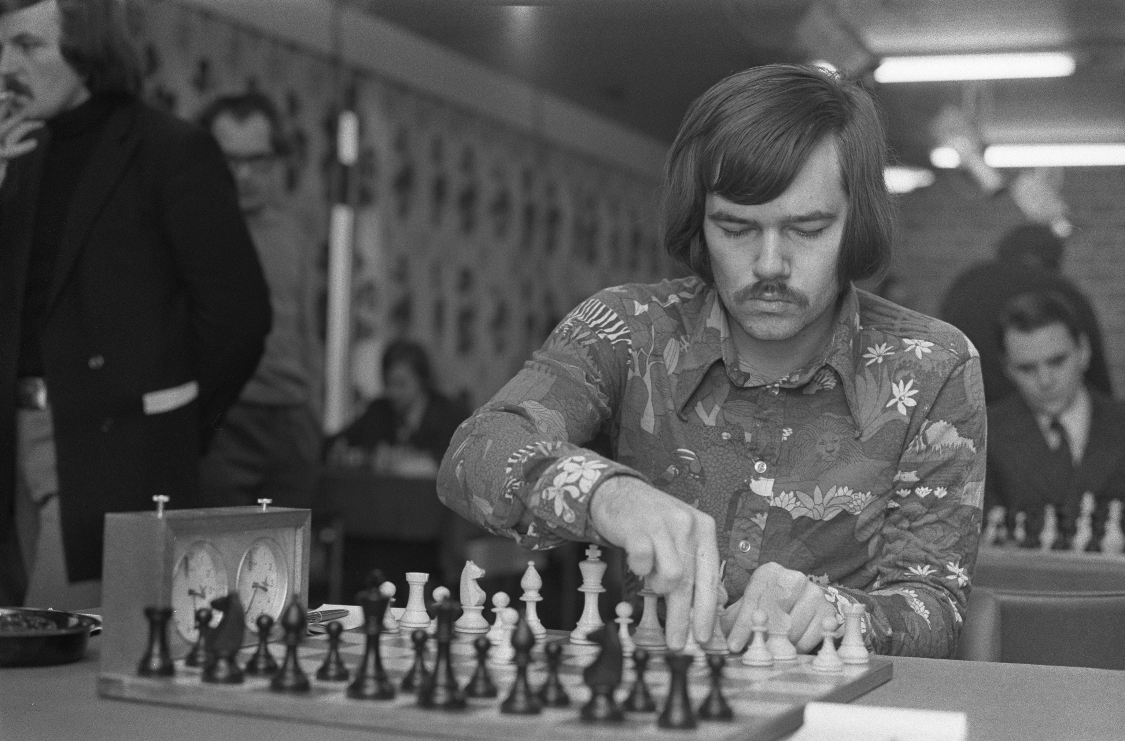 Collectie / Archief : Fotocollectie Anefo Reportage / Serie : Hoogovenschaaktoernooi Beschrijving : Browne in actie Datum : 22 januari 1974 Locatie : Beverwijk, Noord-Holland Trefwoorden : portretten, schaken, schakers Persoonsnaam : Browne, Walter Instellingsnaam : Hoogovenschaaktournooi Fotograaf : Fotograaf Onbekend / Anefo Auteursrechthebbende : Nationaal Archief Materiaalsoort : Negatief (zwart/wit) Nummer archiefinventaris : bekijk toegang 2.24.01.05 Bestanddeelnummer : 926-9591